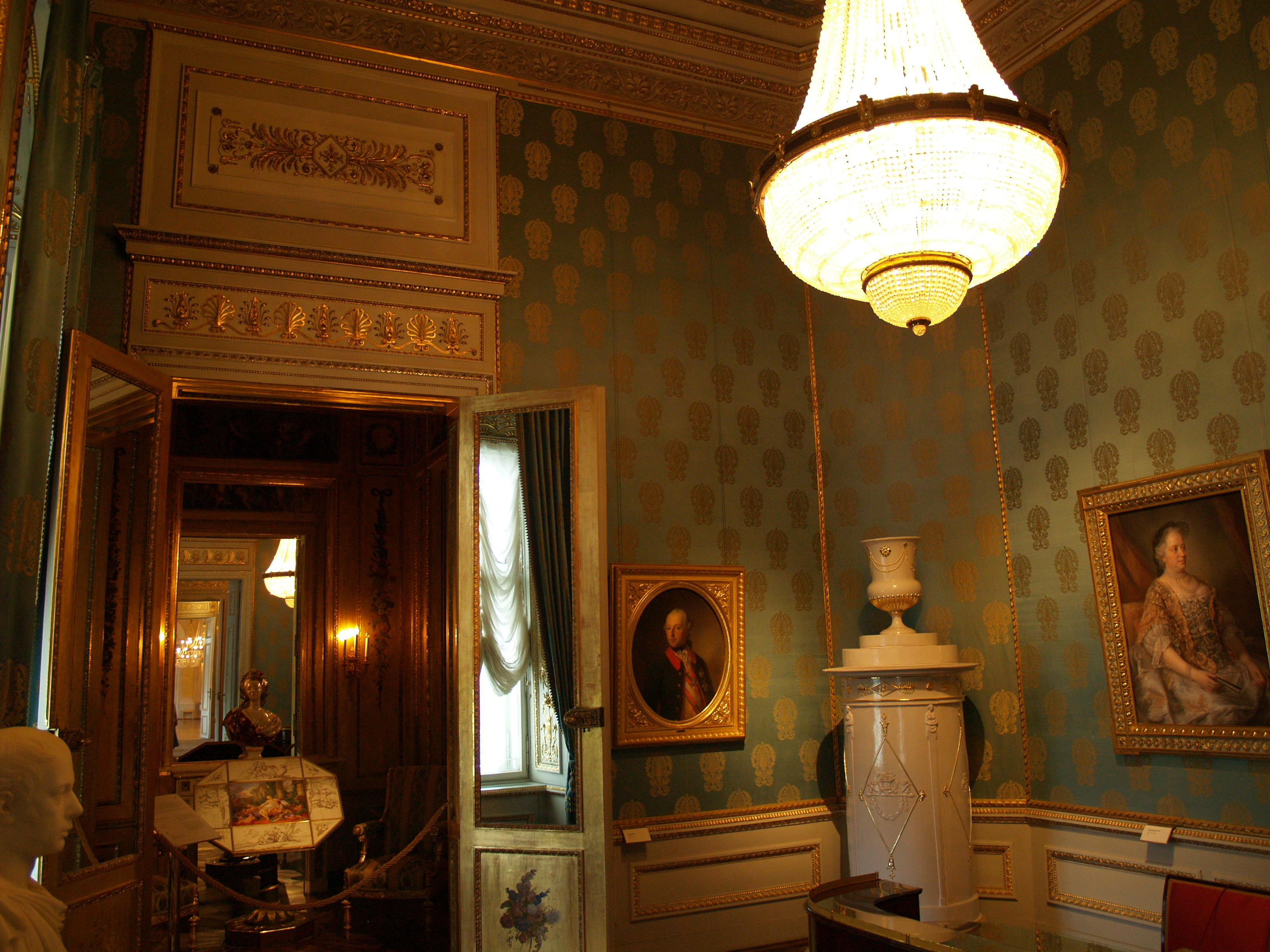 Albertina. Schreibzimmer y gabinete dorado.